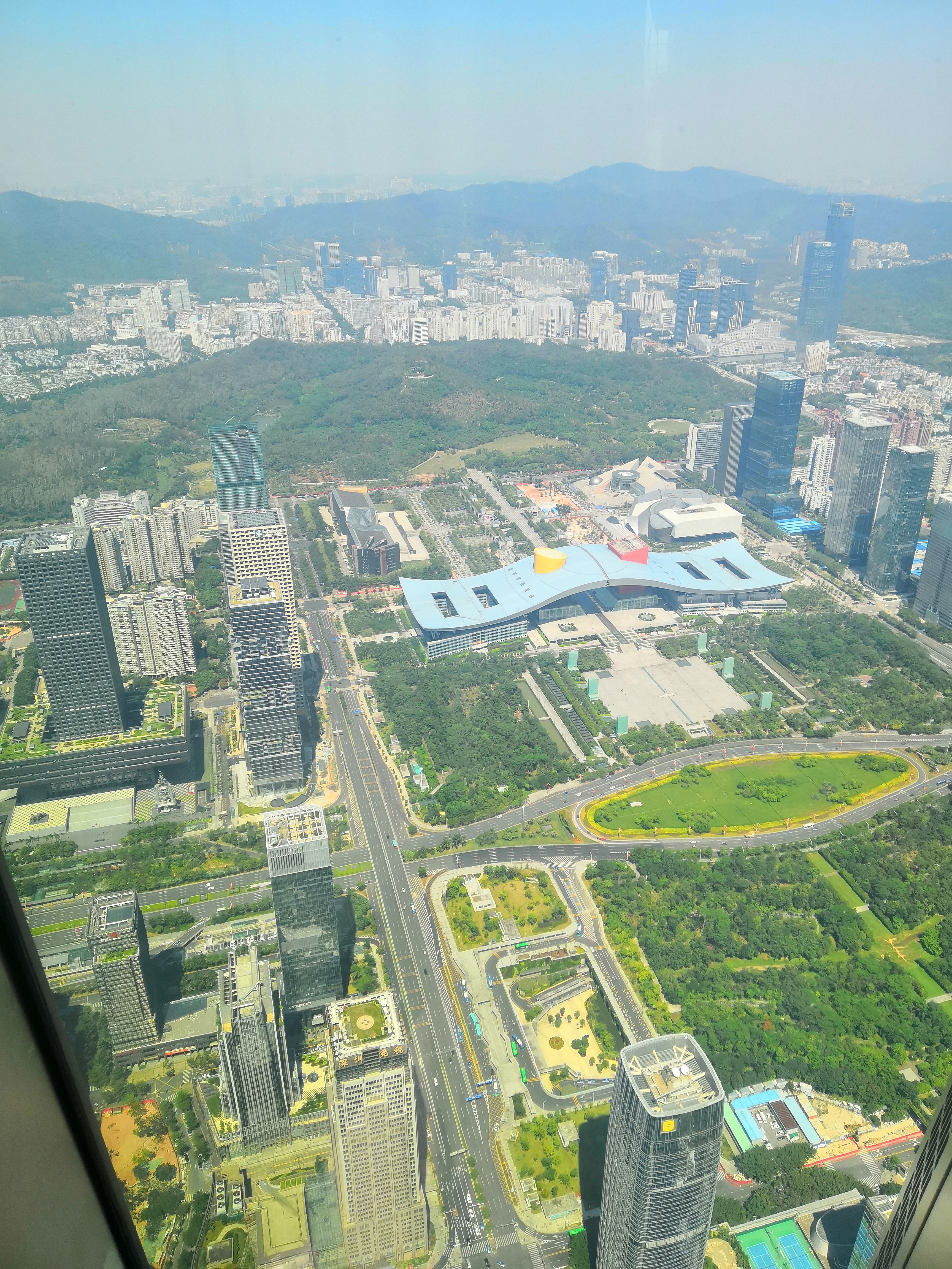 在深圳平安金融中心的FreeSky观光层（116层，541米）朝向东北拍摄的照片。 可以看到不远处的莲花山和市民中心还有深圳书城、深圳图书馆和深圳音乐厅